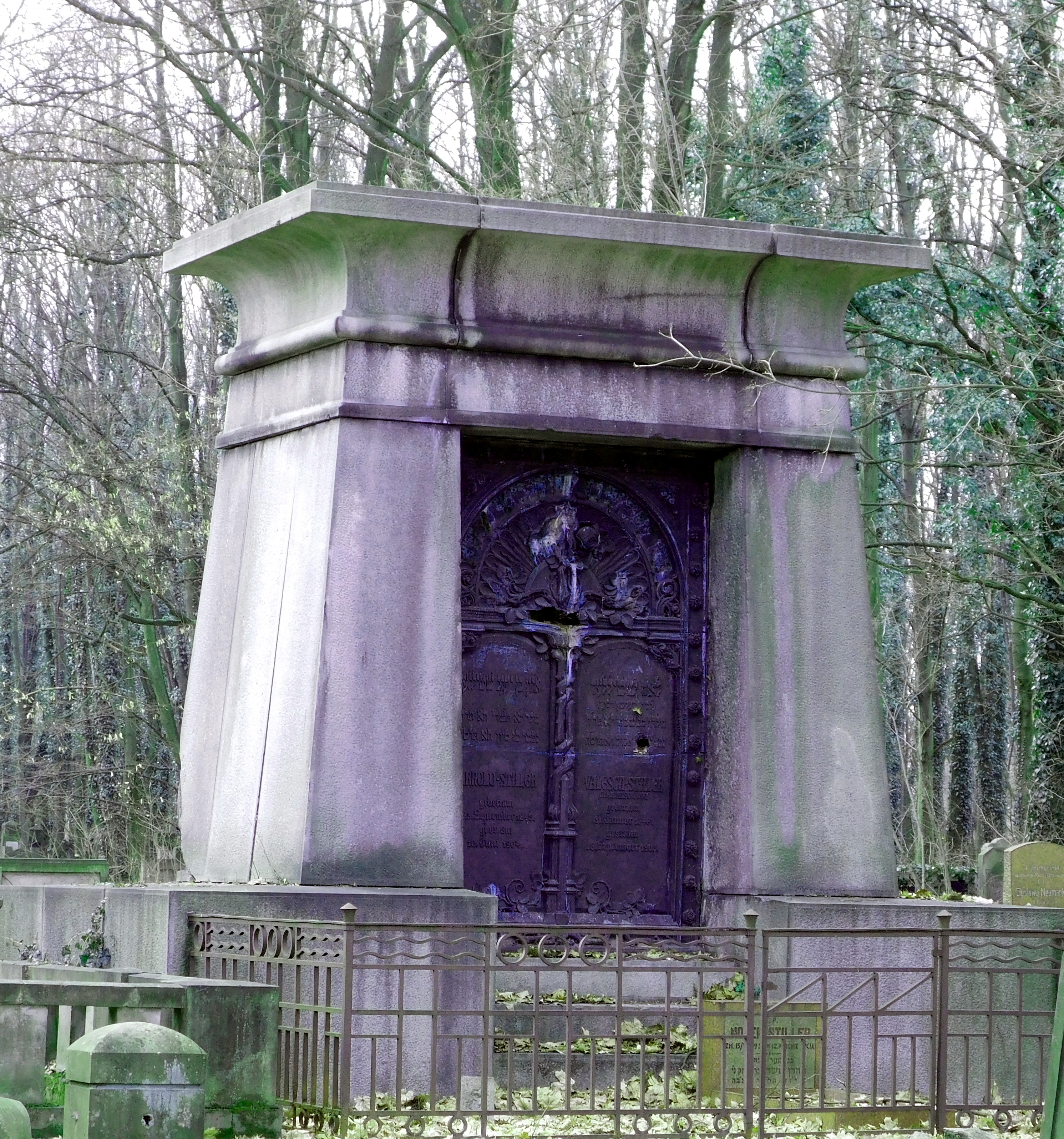 ŁÓDŹ (Лодзь, לודז'). Cmentarz żydowski. Jewish cemetery. Grobowiec Arnolda i Valescii Stillerów.